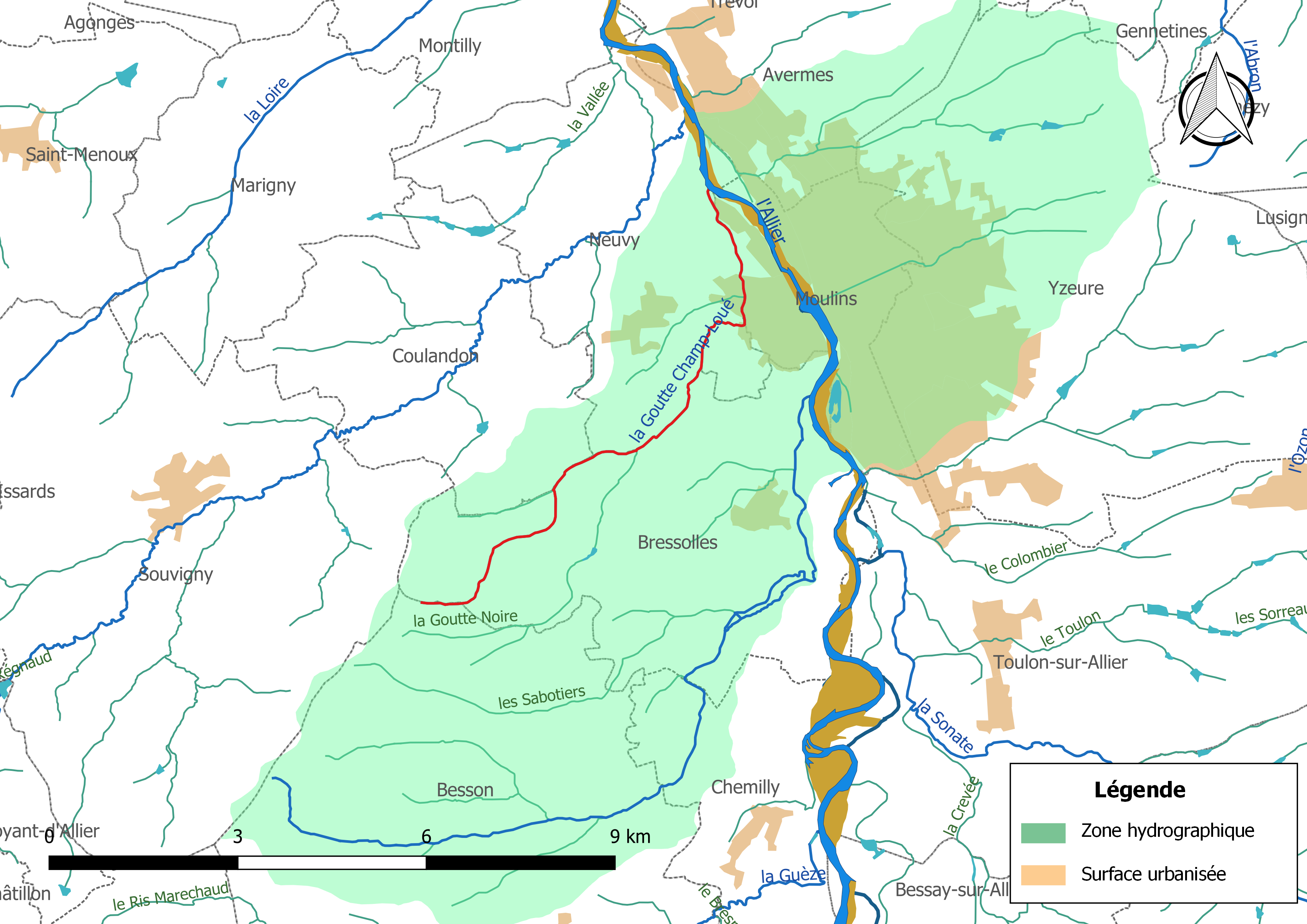 Carte du cours d'eau « la Goutte Champ-Loué » (France) et de la zone hydrographique dans laquelle il s'insère.